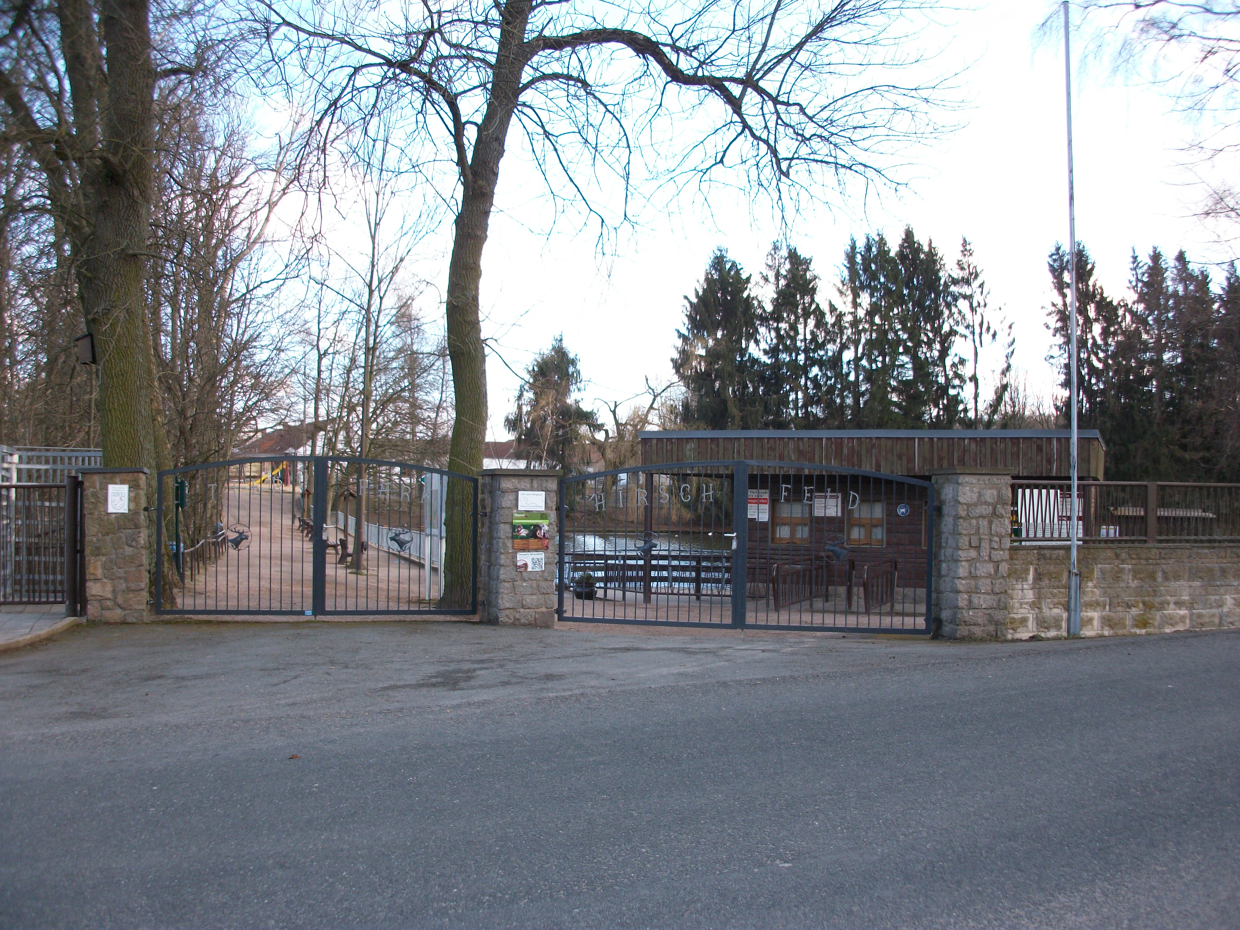 Tierpark Hirschfeld, Eingang